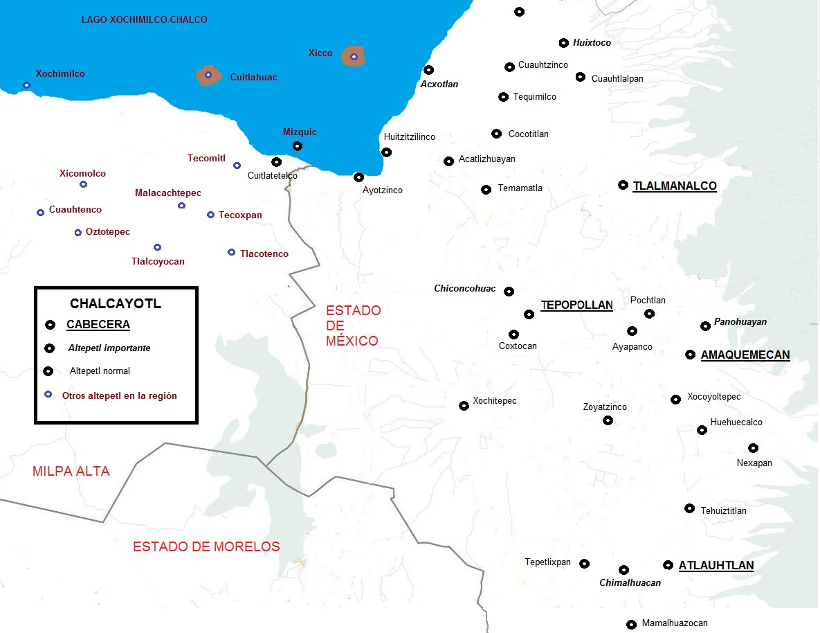 Mapa de la región de Chalco en el posclásico tardío (1519); se ubican la mayoría de su poblaciones. Las cuatro cabeceras están marcadas con subrayado y letra más grande.